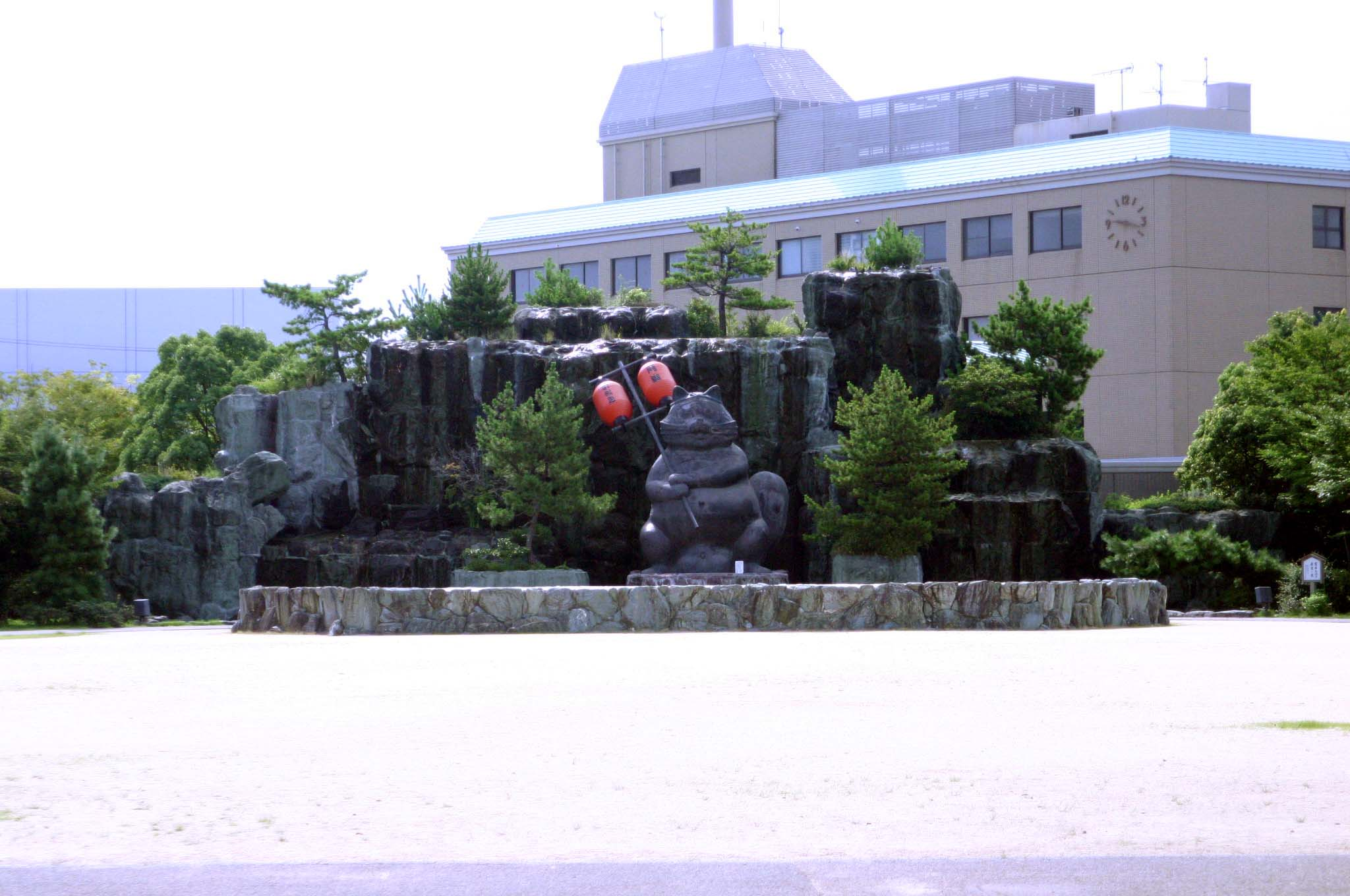 狸広場全景